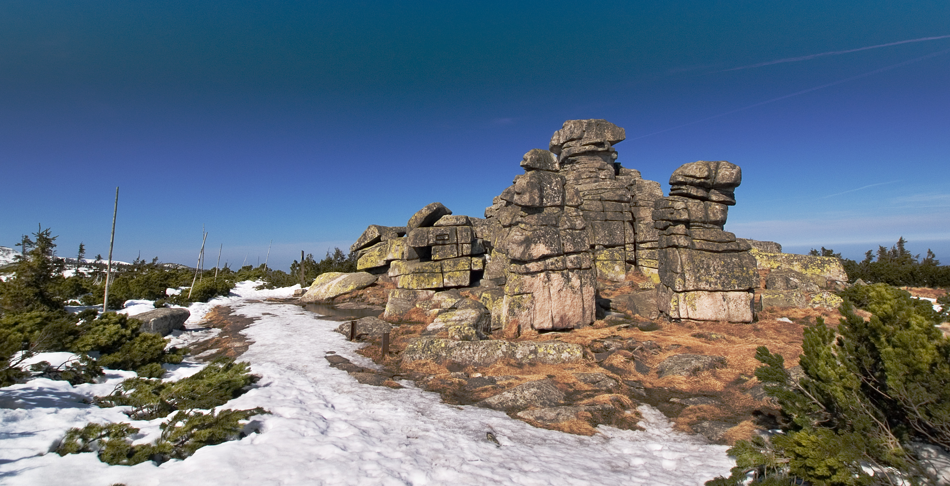 Grupa skalna Śląskie Kamienie w Karkonoszach